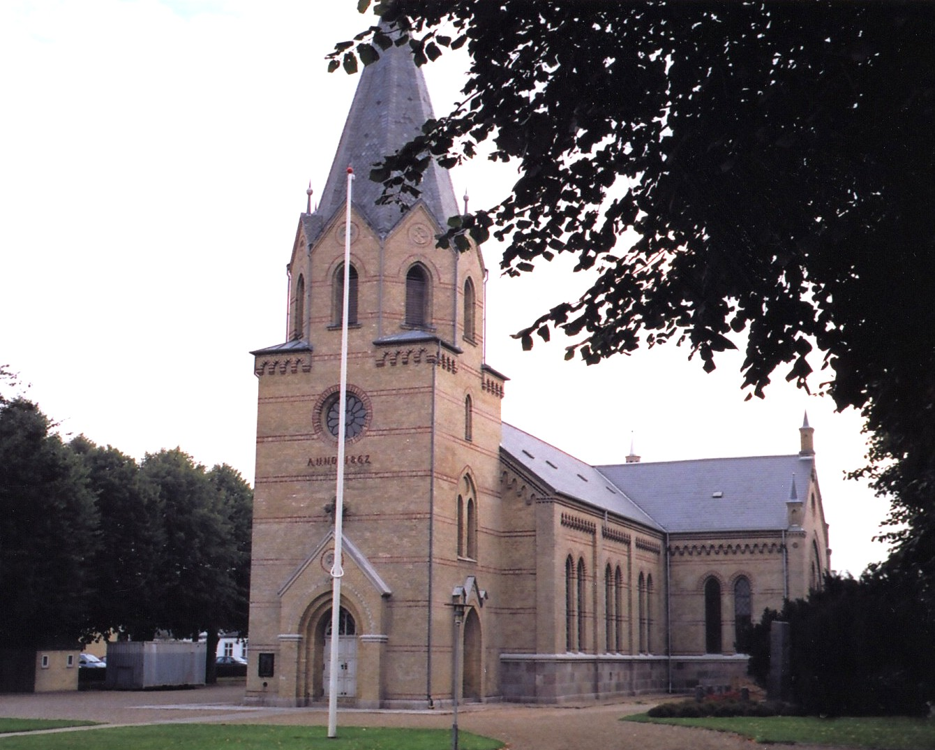 Tyrstrup kyrka i Christiansfeld, Danmark